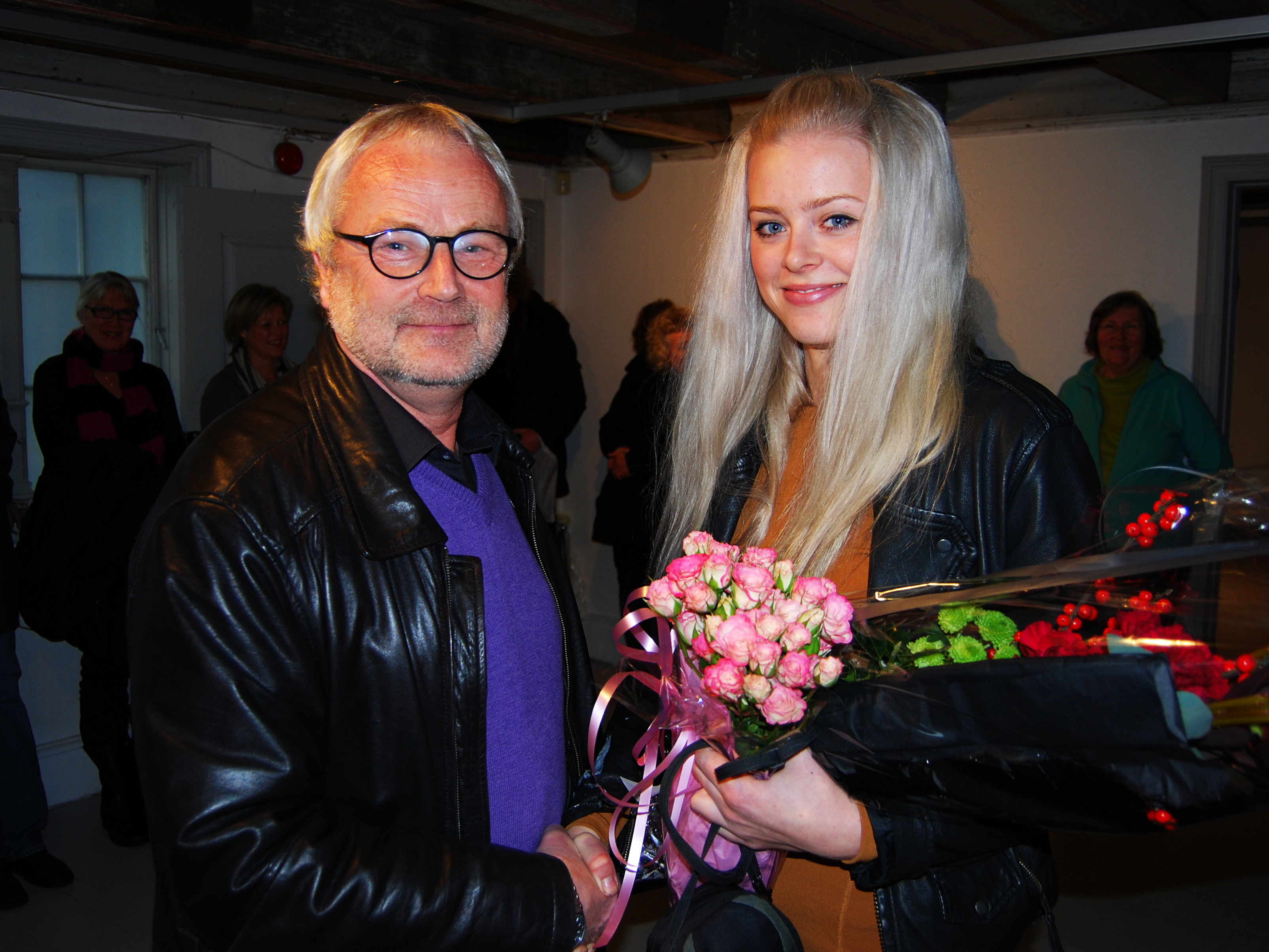 Skulptøren Signe Løvland Solberg og Per Norstrøm, fylkeskultursjef i Aust-Agder ved utdelingen av Aust-Agder fylkeskommunes kunstnerstipend i 2011.